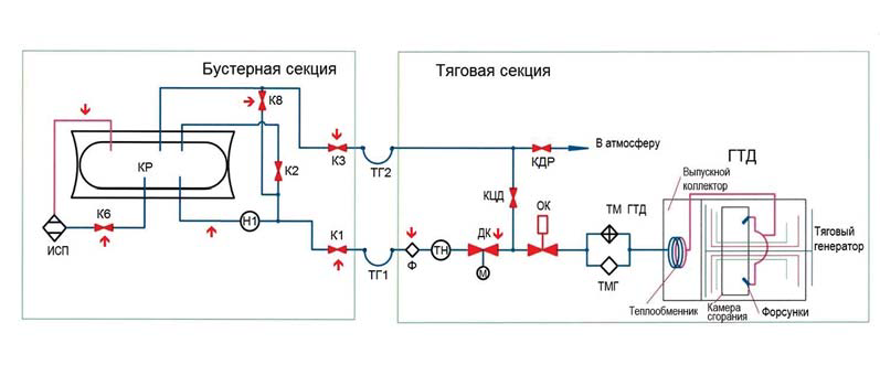 Старая топливная система газотурбовоза ГТ1-001